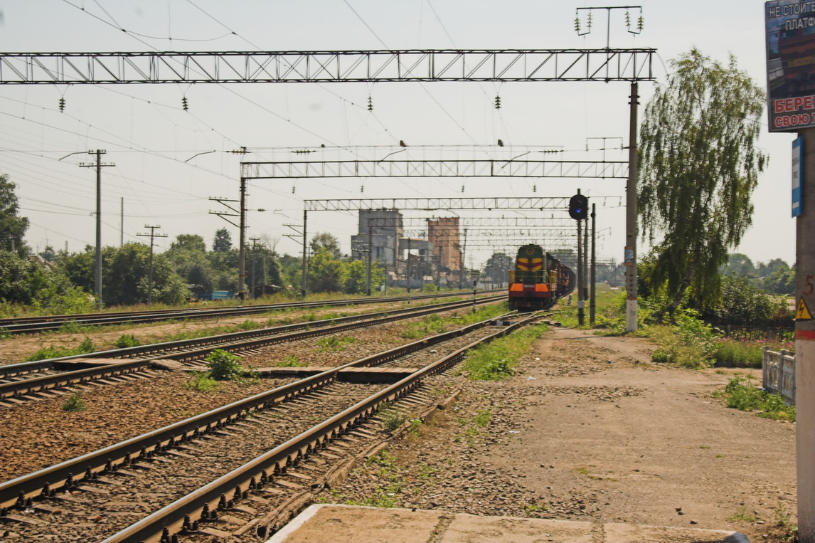 Станция Тербуны